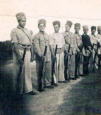 אנשי פו"ש בכפר ביל"ו ב-1938